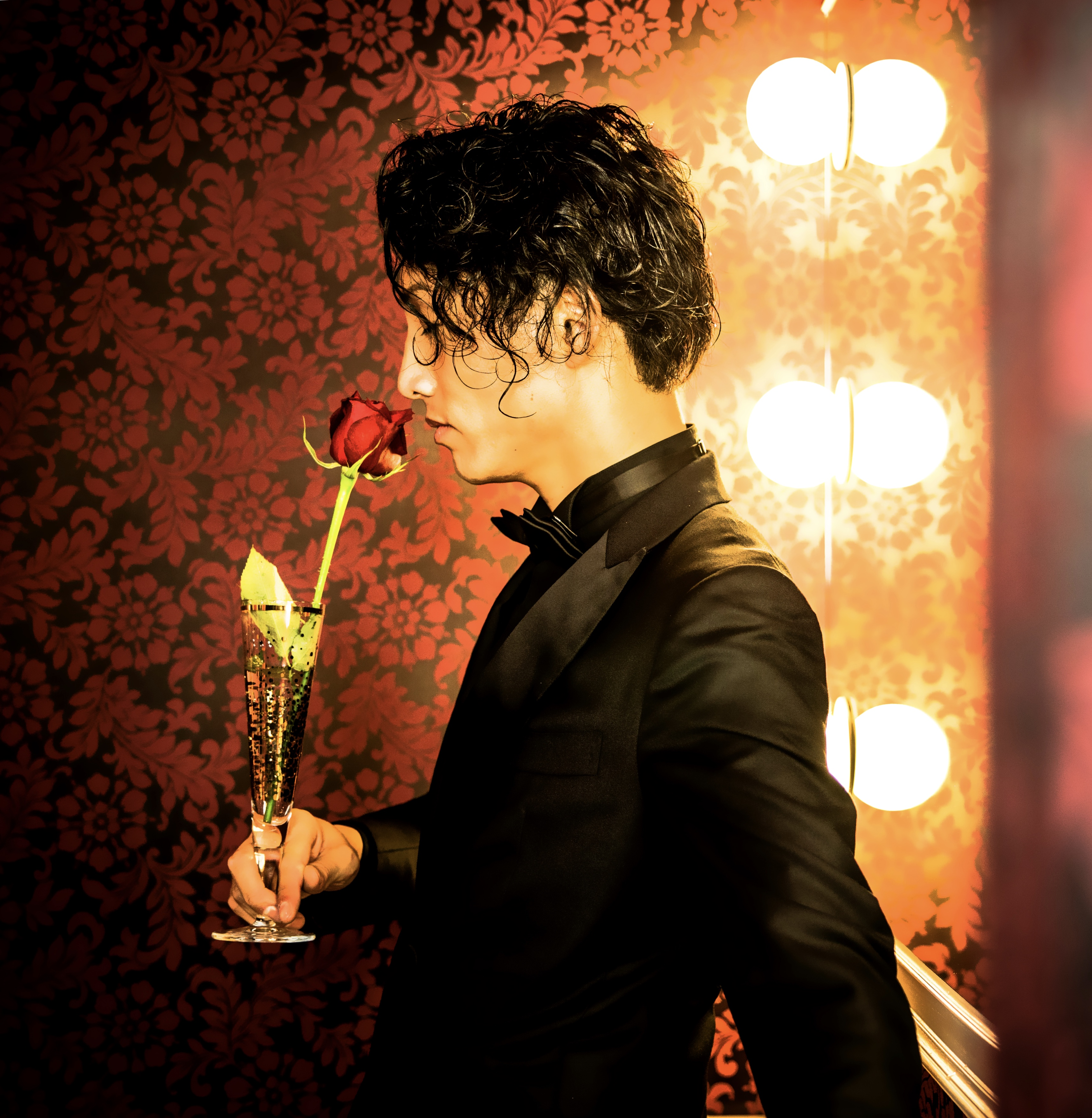 増田タカノリ 本人の写真